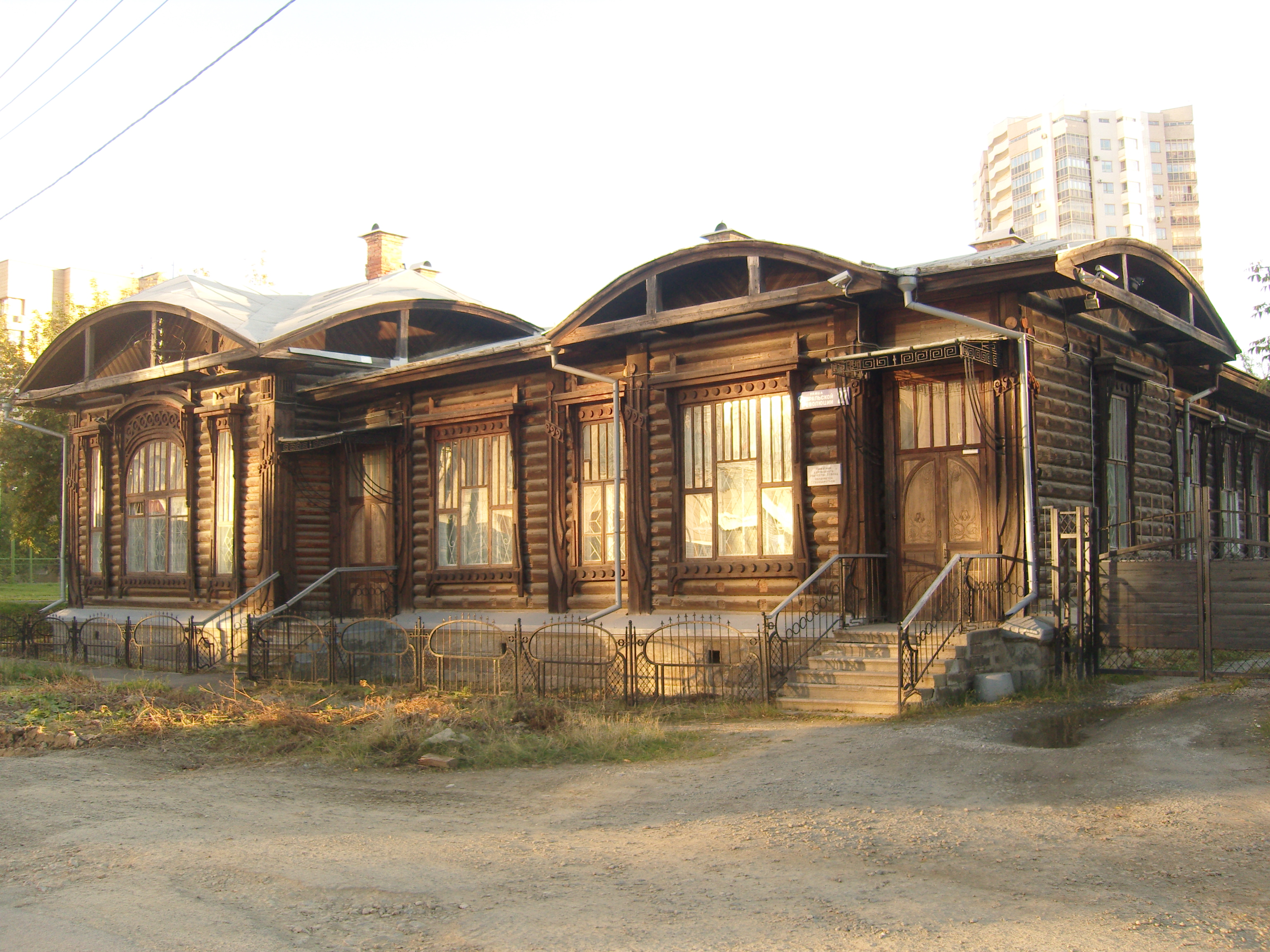 Жилой дом, нач. XX века.